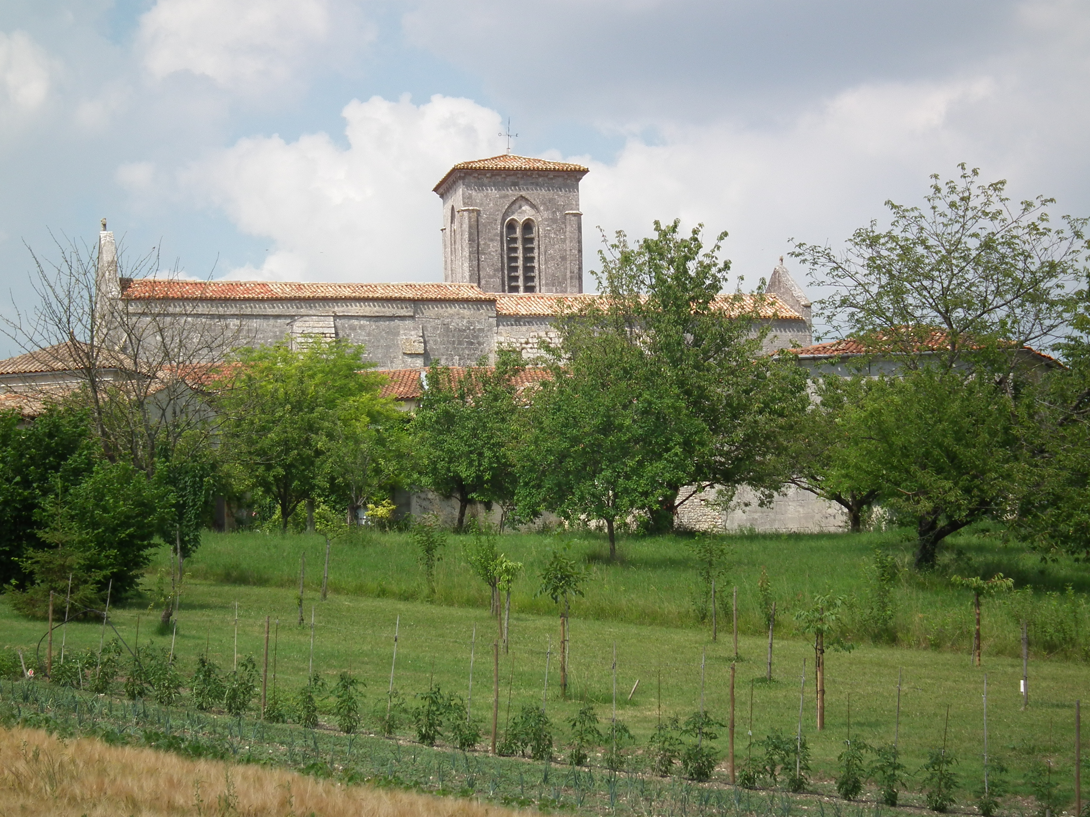 L'eglise de Sainte-Lheurine